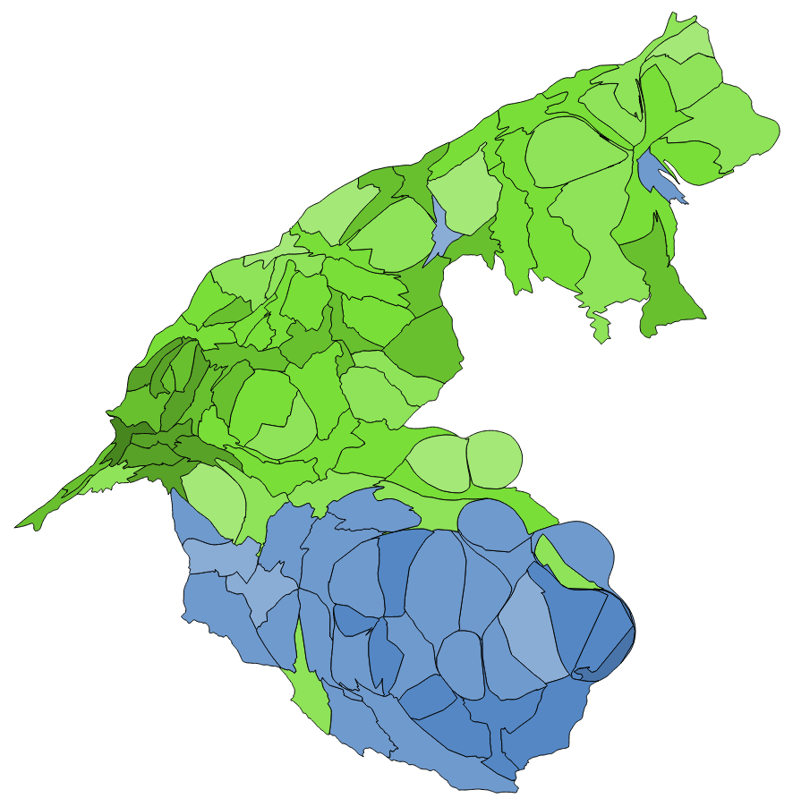 中文（台灣）: 顏色對照表